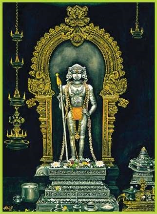 பழநி தண்டாயுதபாணி சுவாமி - மூலவர் திருவுருவச்சிலை